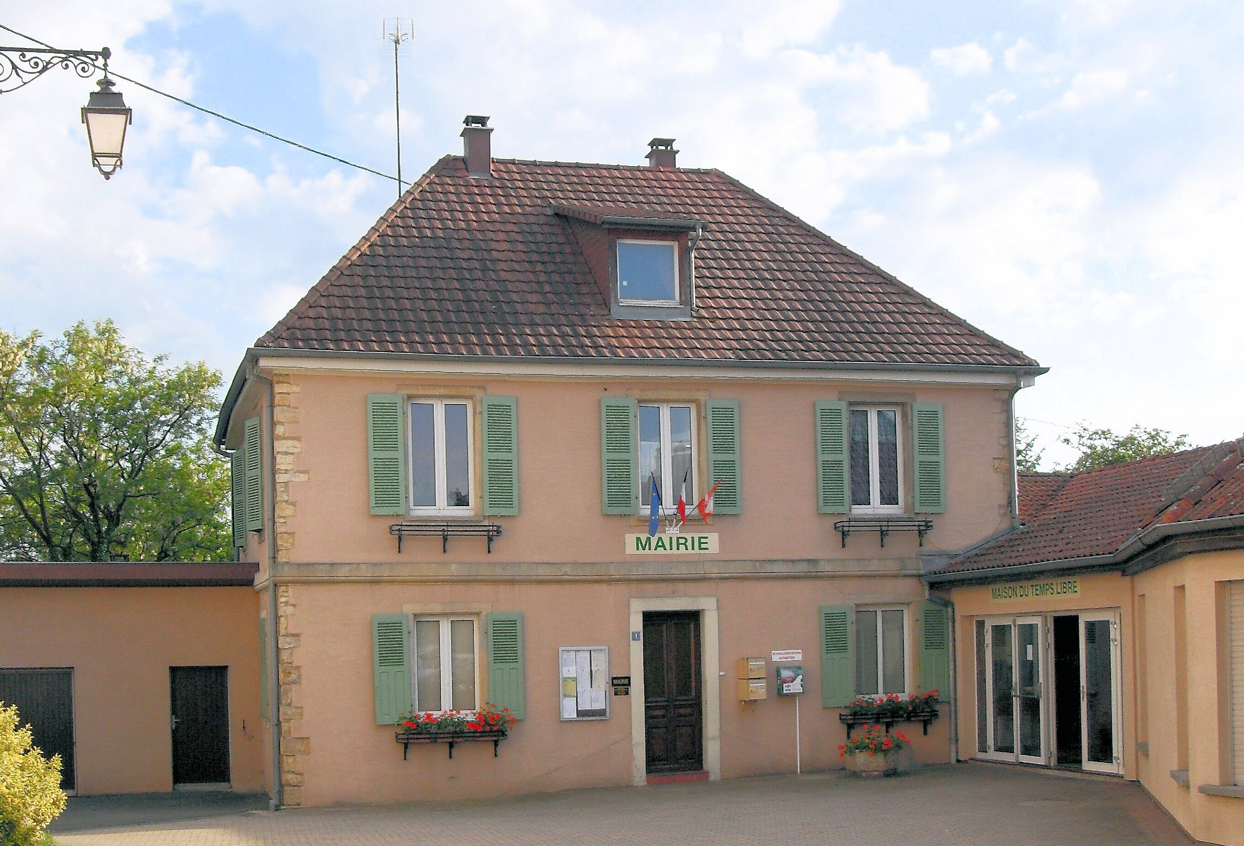 La mairie de Largitzen